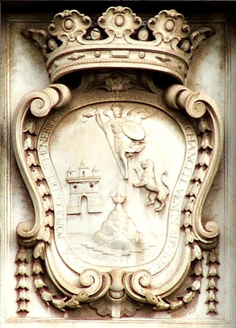 Wappenschild der Stadt La Laguna am Rathaus (Santa Cruz de Tenerife, Spanien)